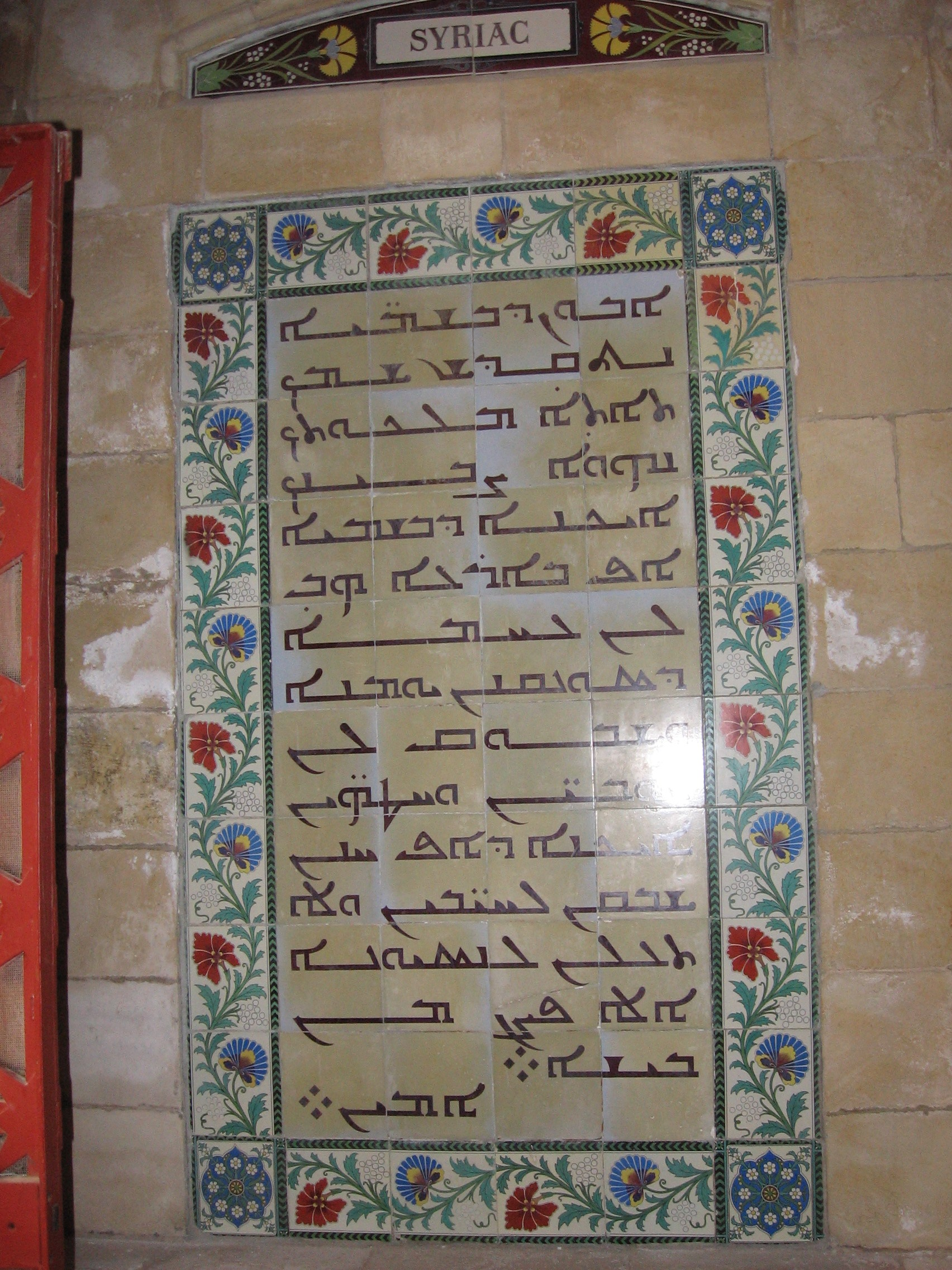 Chiesa del Padre Nostro, a Gerusalemme. Preghiera in siriaco